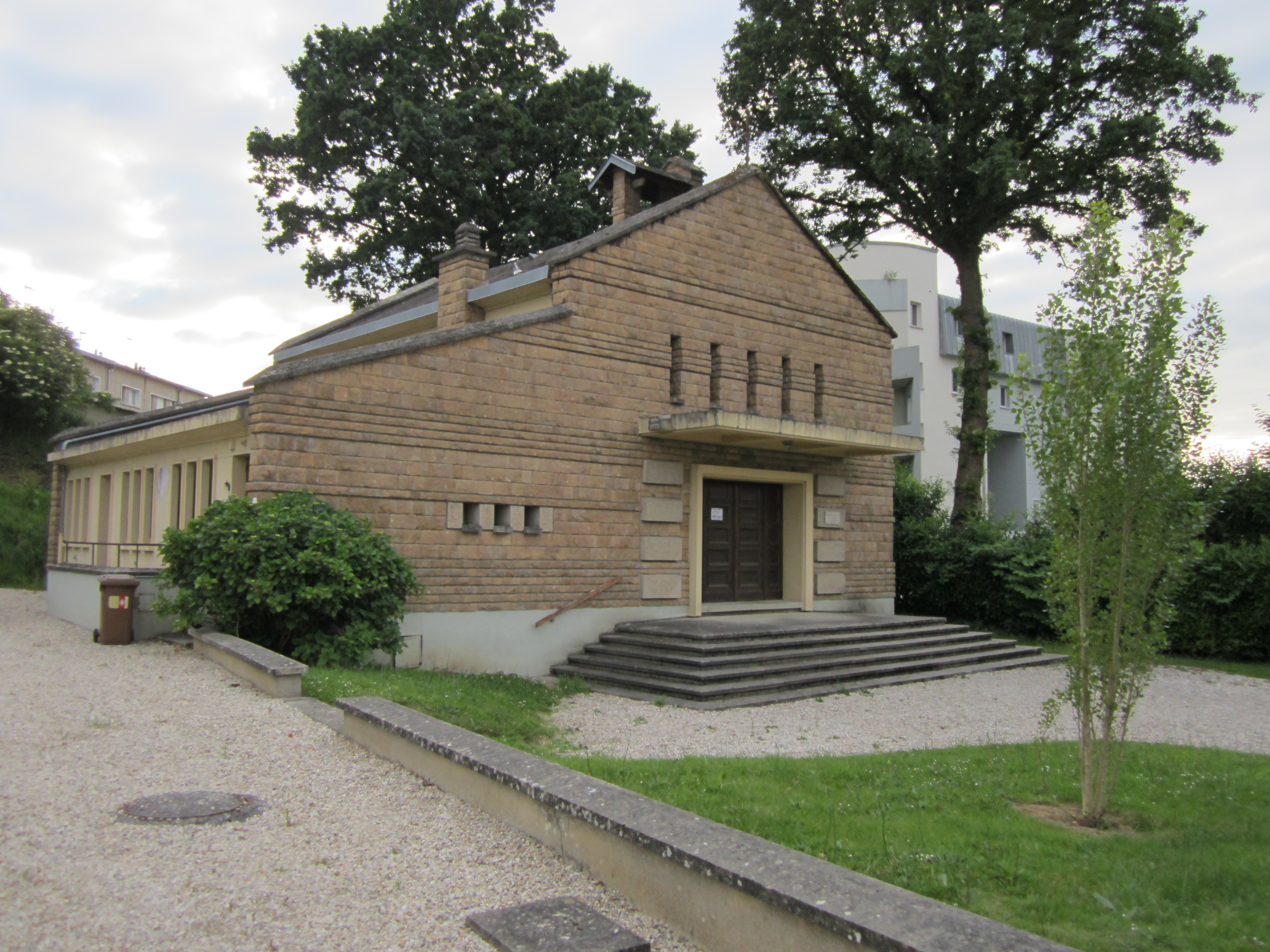 Saint-Lô